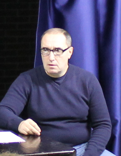 на одном из занятий с учениками